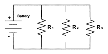 Qark me rrymë të vazhduar